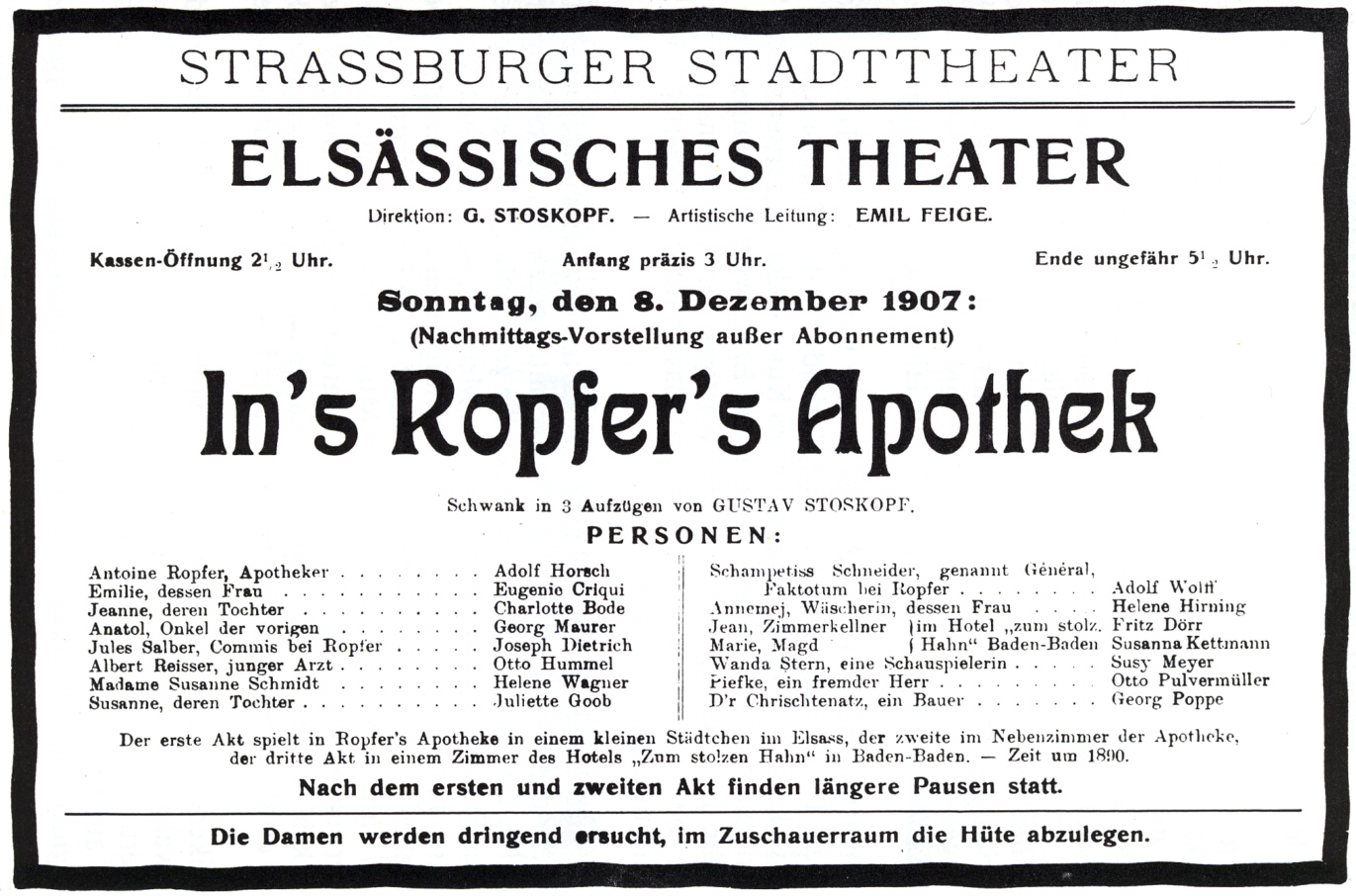 Azeig vum Elsässer Theater Stroßburg (1907) fir em Gustav Stoskopf si Stick "In's Ropfer's Apothek"